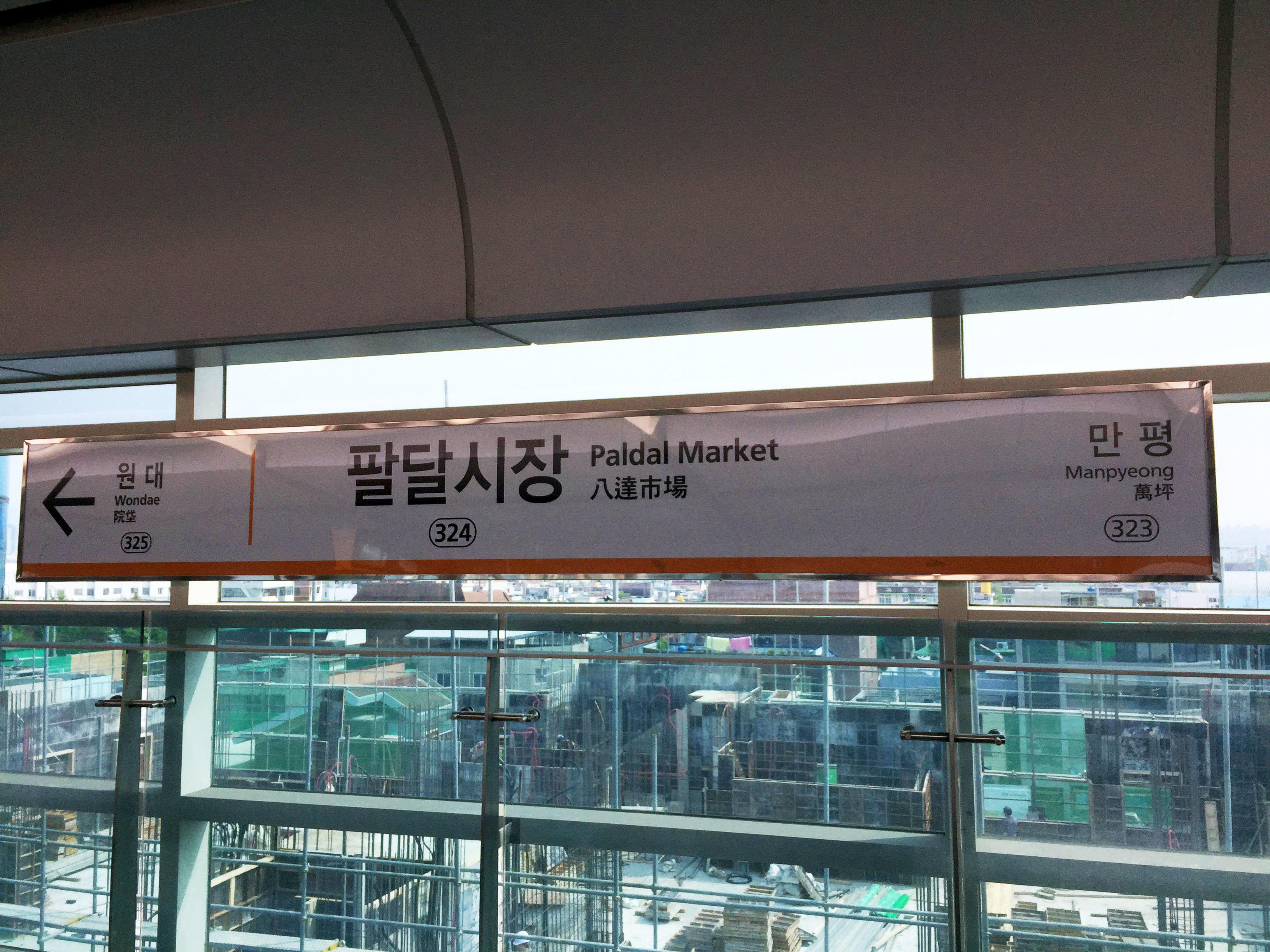 팔달시장역 역명판